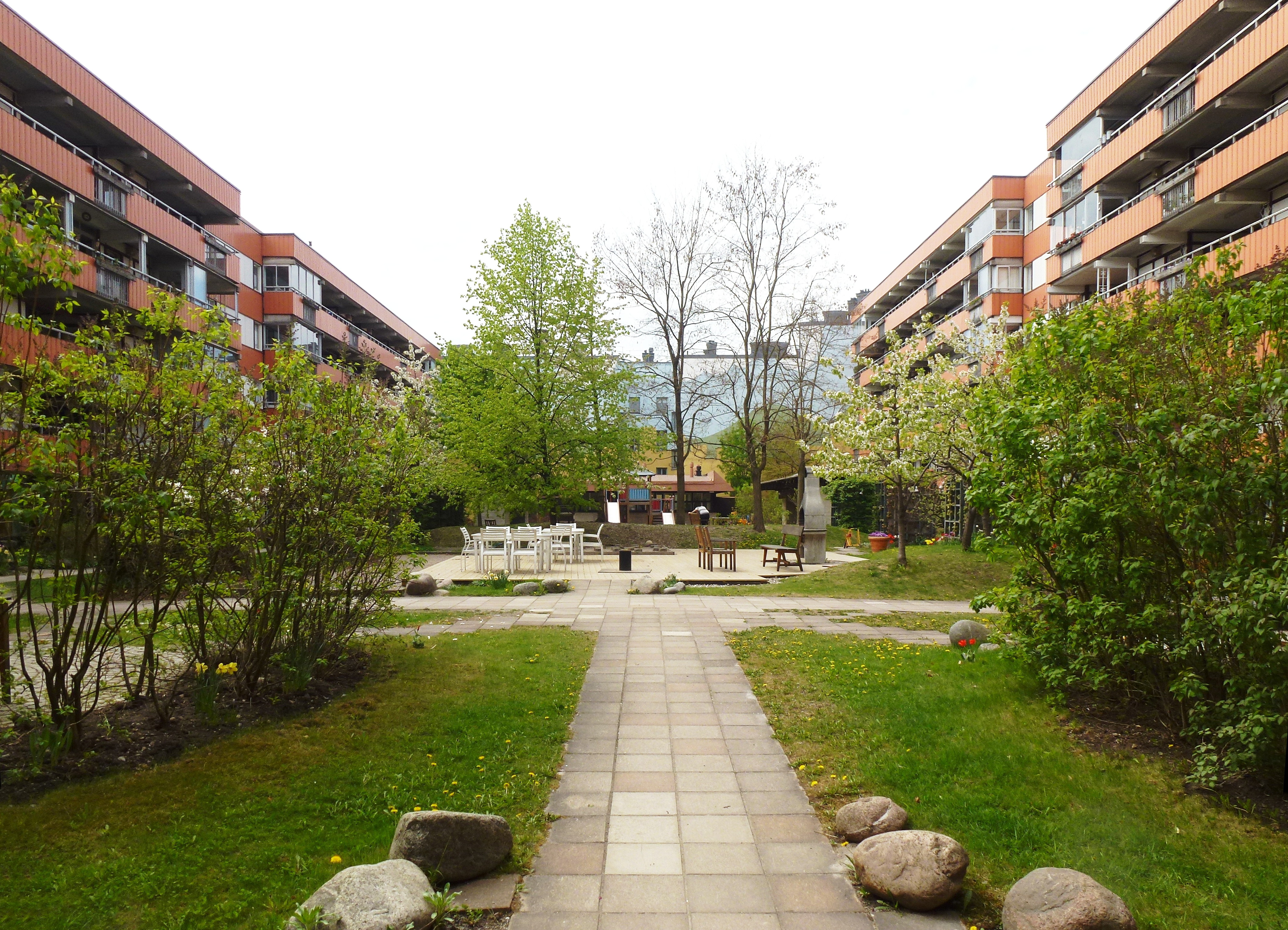 Vägaren 23, gården, arkitekt Bengt Lindroos